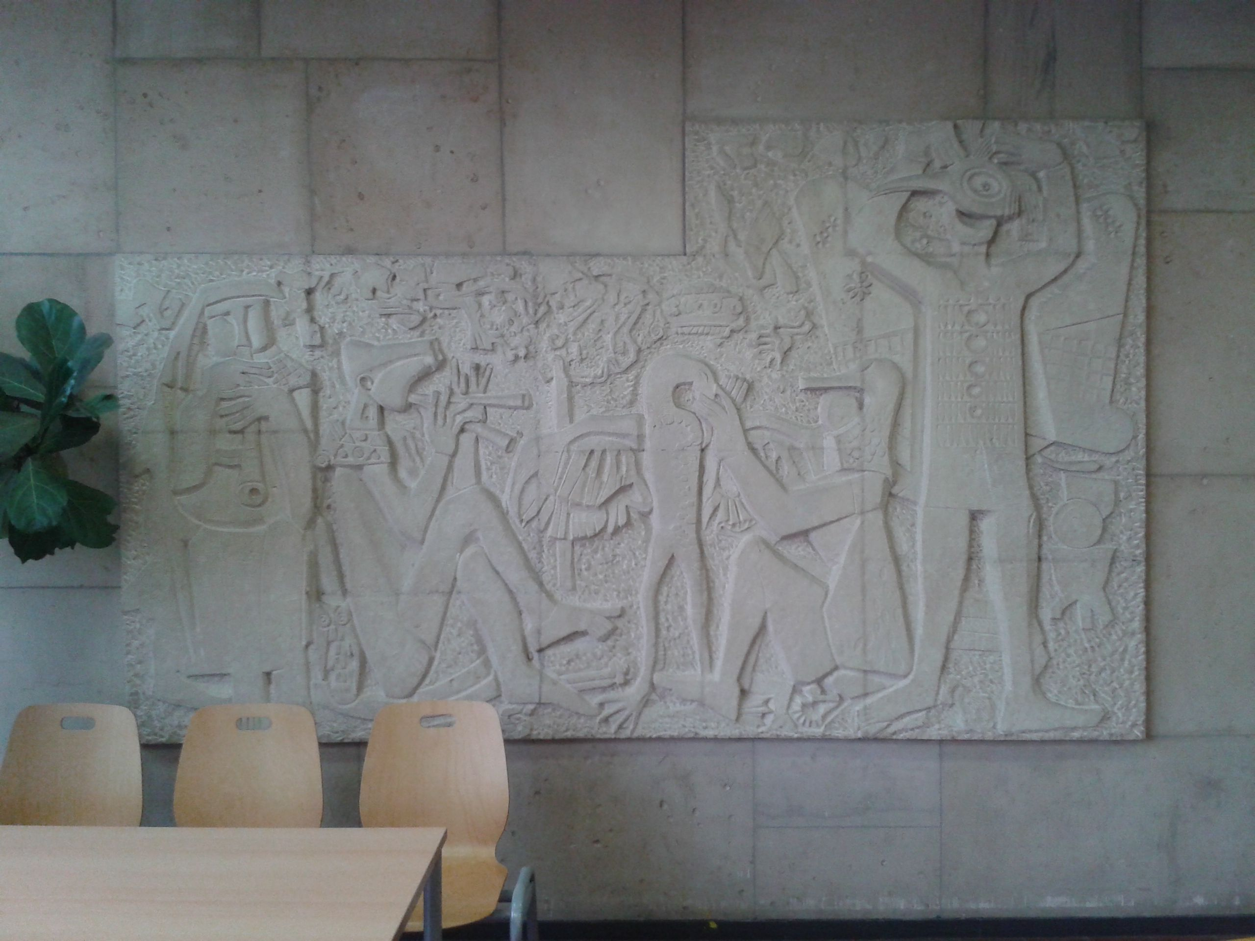 Halbrelief von Hans Kindermann "Ornithes" (1955) im Schulgebäude des Humboldt-Gymnasiums, Düsseldorf